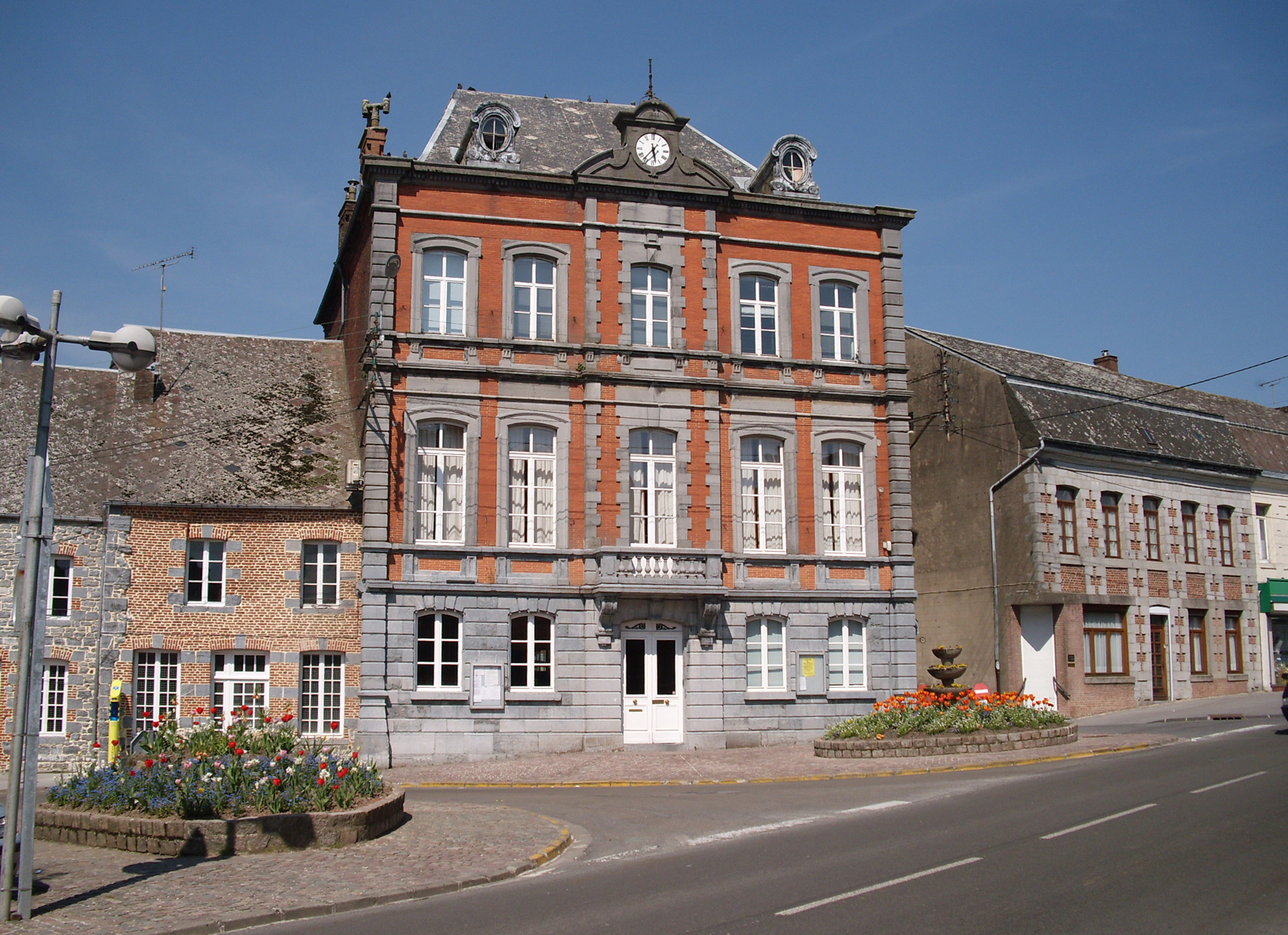 La Mairie de Trélon - Place Jean Jaurès - Commune de Trélon - Canton de Trélon - Arrondissement d'Avesnes-sur-Helpe - Département du Nord - Région du Nord-Pas-de-Calais - France